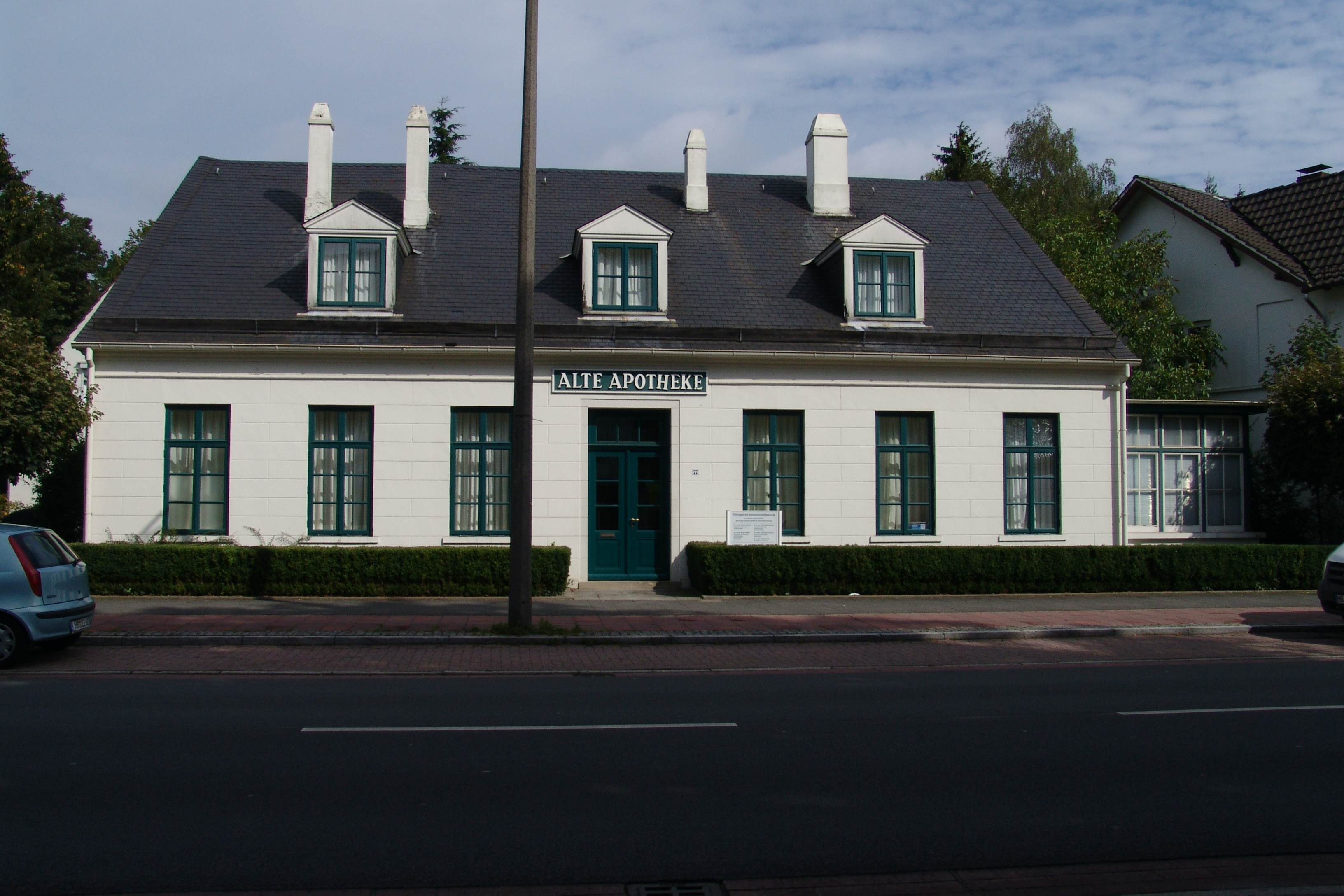 Lesumer Apotheke in Bremen, Hindenburgstraße 77.Das abgebildete Objekt ist ein geschütztes Kulturdenkmal in der Freien Hansestadt Bremen, mit der Nr. 1283 beim Landesamt für Denkmalpflege registriert.